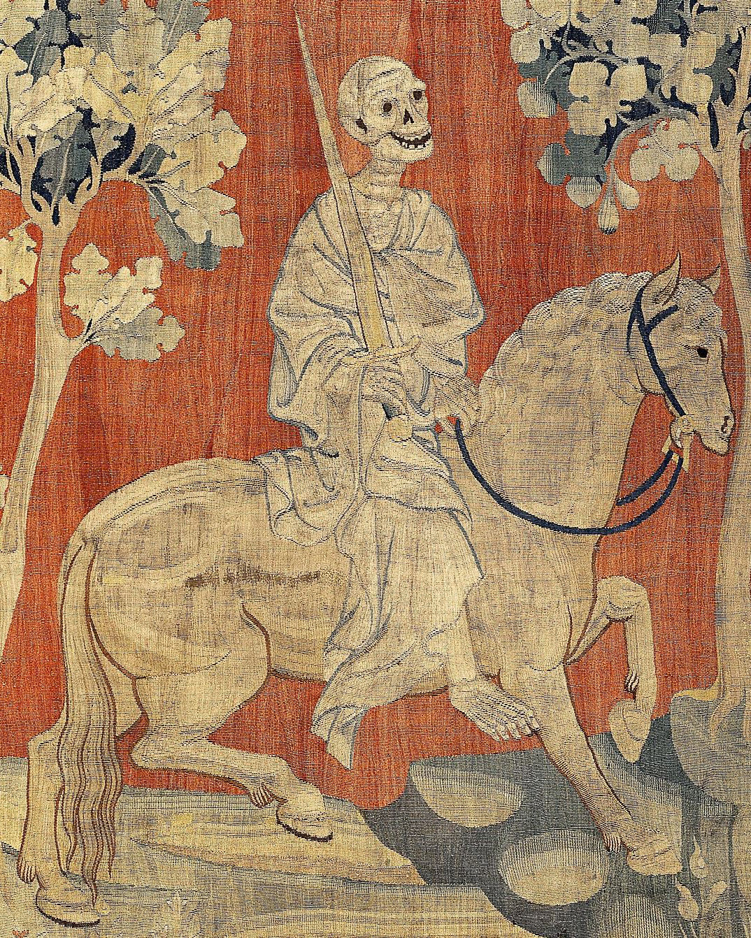 Le cheval livide et la mort. Détail de la douzième pièce de la première tapisserie de la Tenture de l'Apocalypse d'Angers, France.